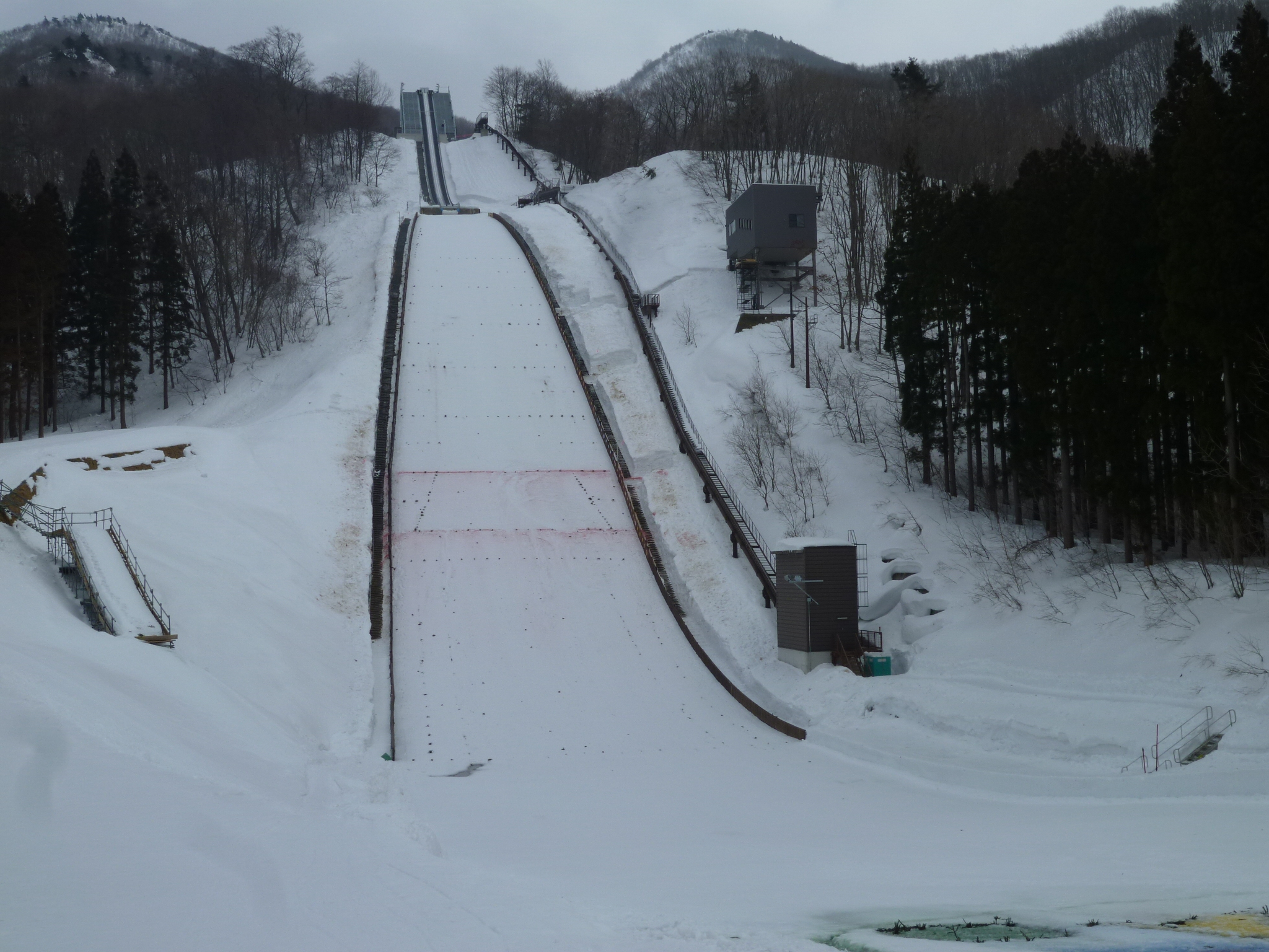 山形市蔵王ジャンプ台。蔵王温泉スキー場竜山ゲレンデ隣。